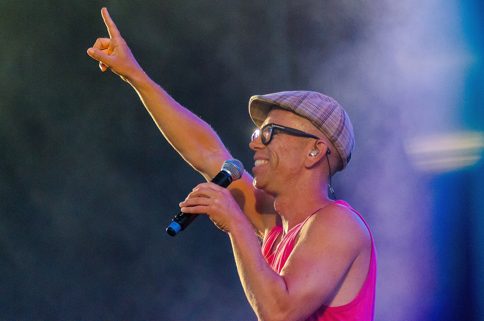 Eric Amarillo uppträder på RixFM festival i Växjö, augusti 2011.